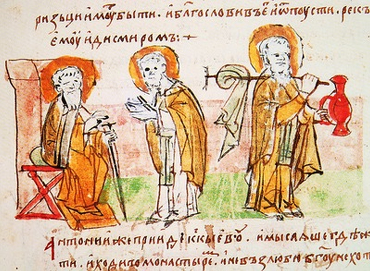 Игумен горы Афон постригает преподобного Антония и благословляет возвратиться на Русь. Миниатюра Радзивиловской летописи. Кон. XV в. Л. 90 об. (БАН. 34.5.30).